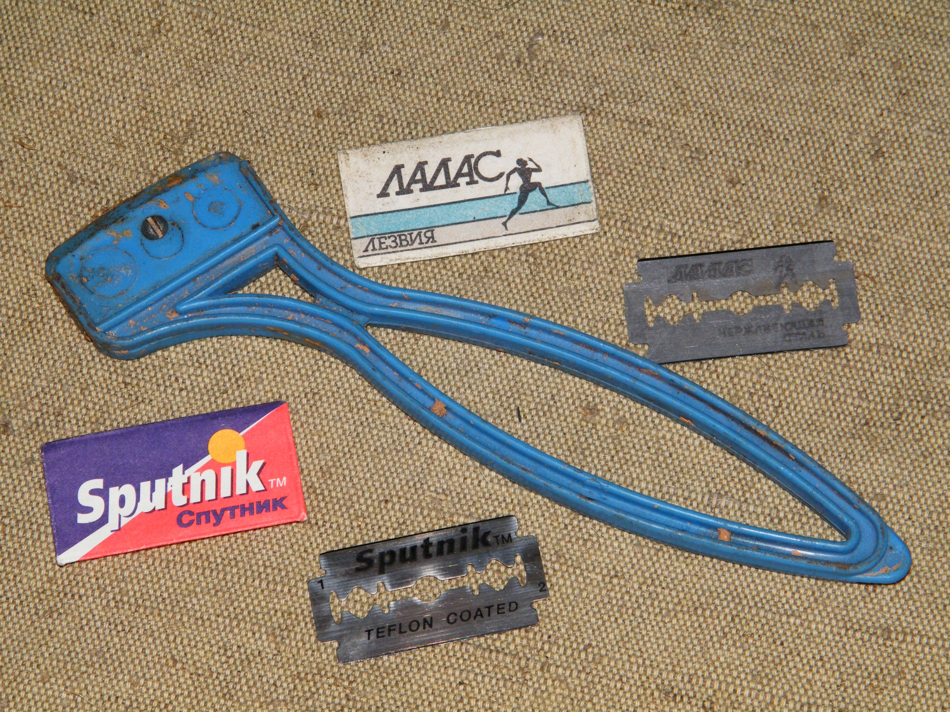 Лезвия Спутник и Ладас и хозяйственный держатель